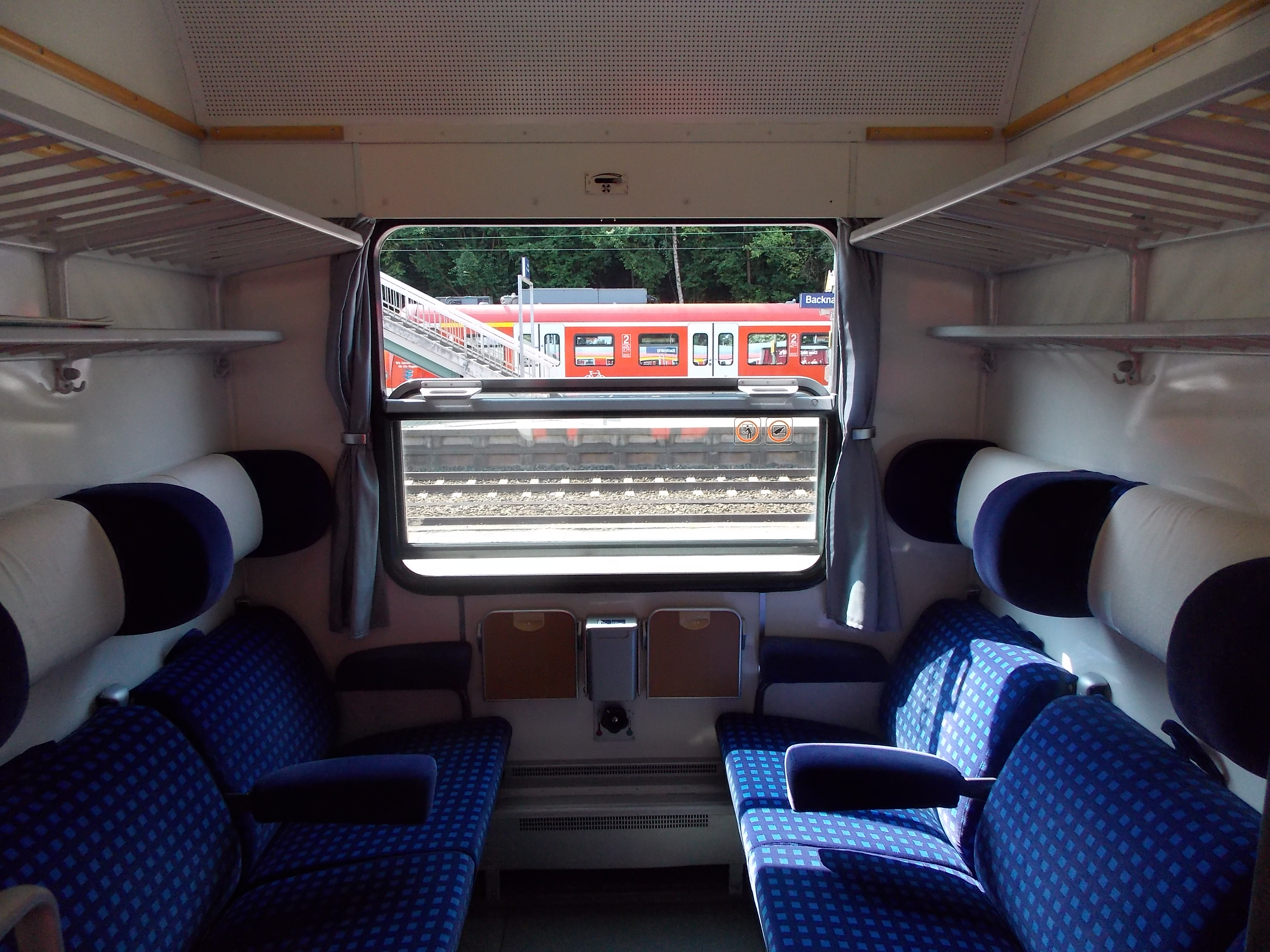 Das Erste-Klasse-Abteil eines n-Wagens, wie er noch bei DB Regio Stuttgart unterwegs ist